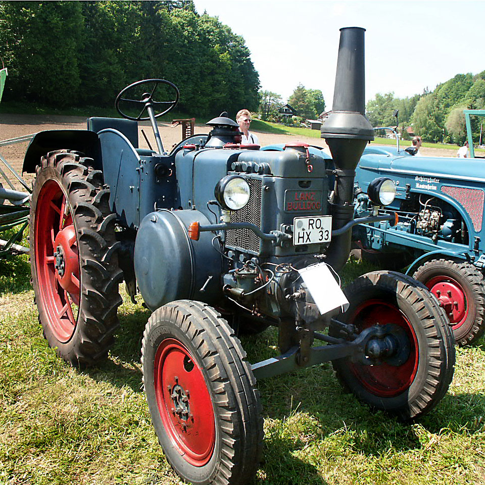 Lanz Bulldog D3506, Baujahr 1949, 20 PS, Hubraum: 4,7 Liter, Vielstoff-Einzylinder-Zweitakt-Glühkopf-Mitteldruckmotor